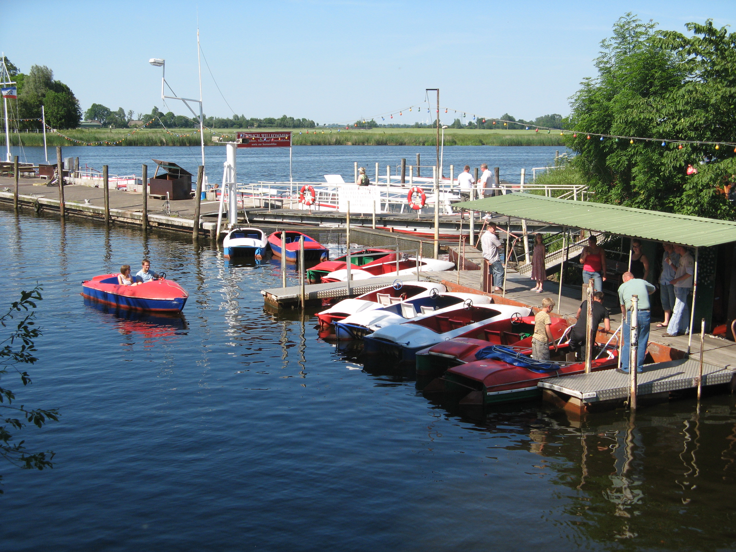 Treene River in Friedrichstadt